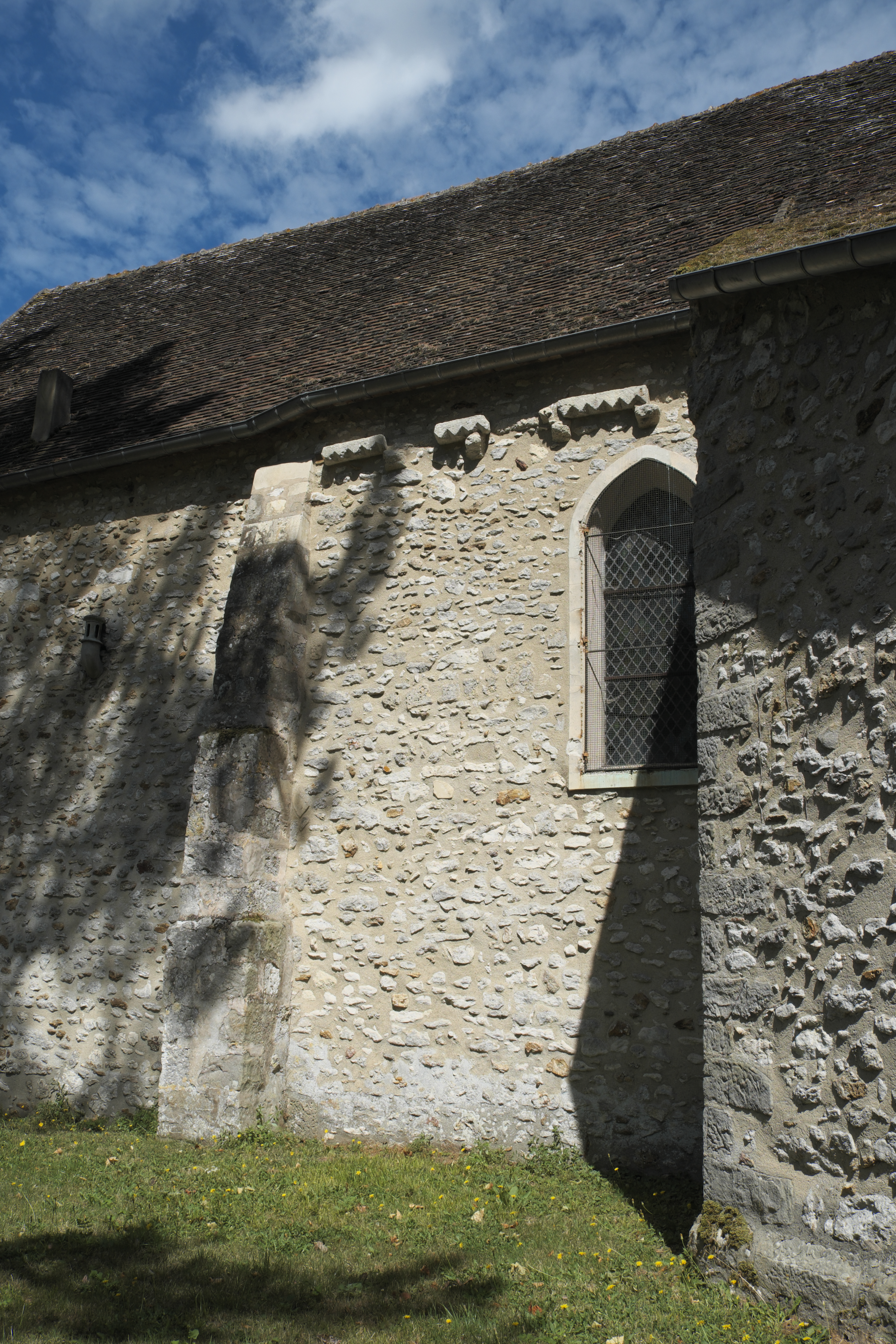 Kirche Sainte-Osmanne in Féricy im Département Seine-et-Marne (Île-de-France/Frankreich), Südseite mit Fragmenten eines Sägezahnfrieses aus dem 12. Jahrhundert